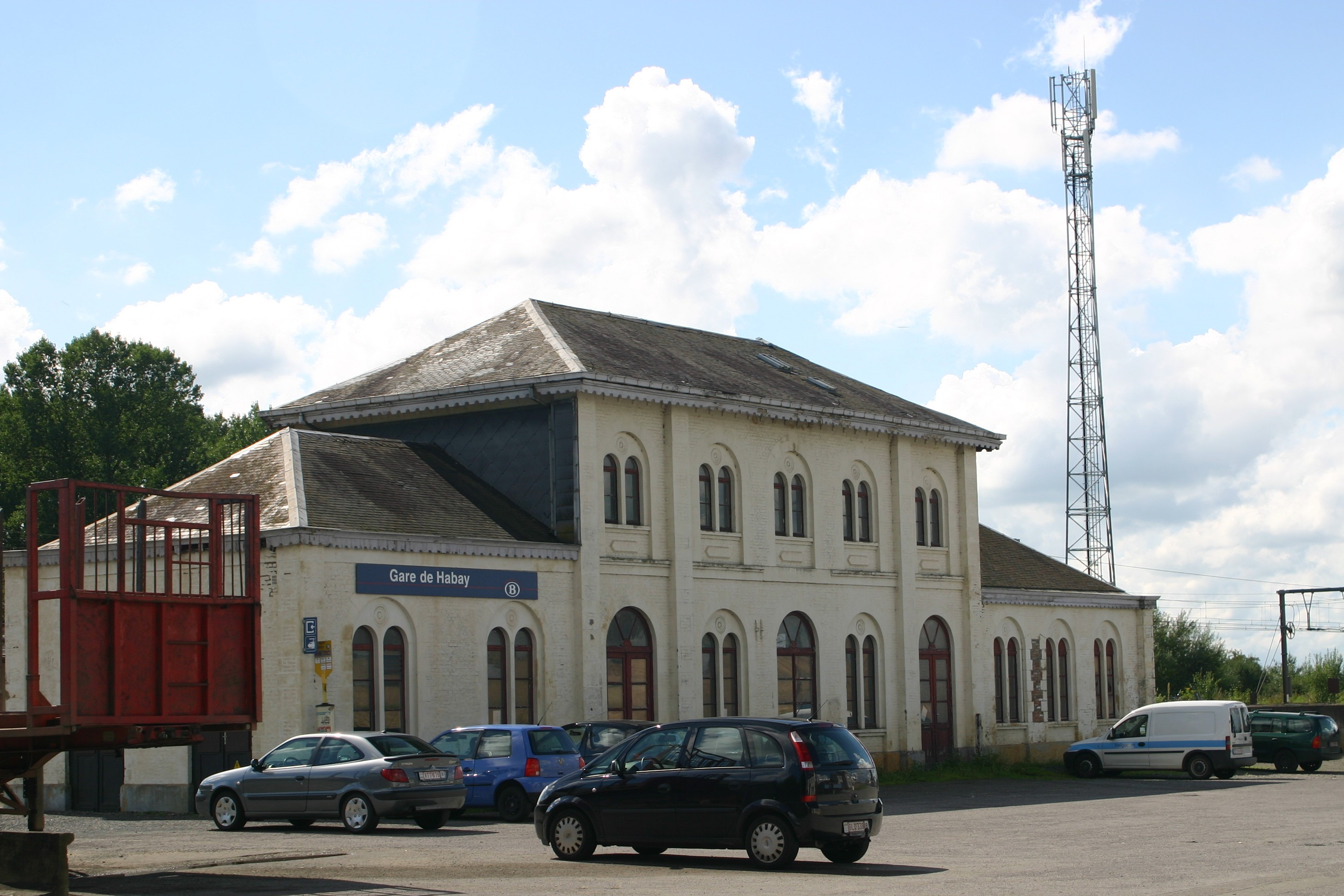 Gare de Habay en Août 2008